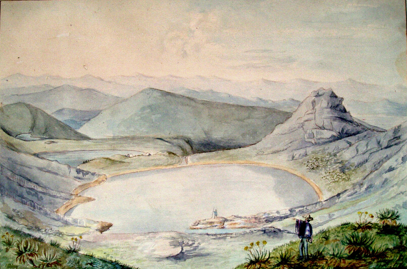 Lagunas de Siecha, Lámina 103 de la Comisisón Corográfica, 8.